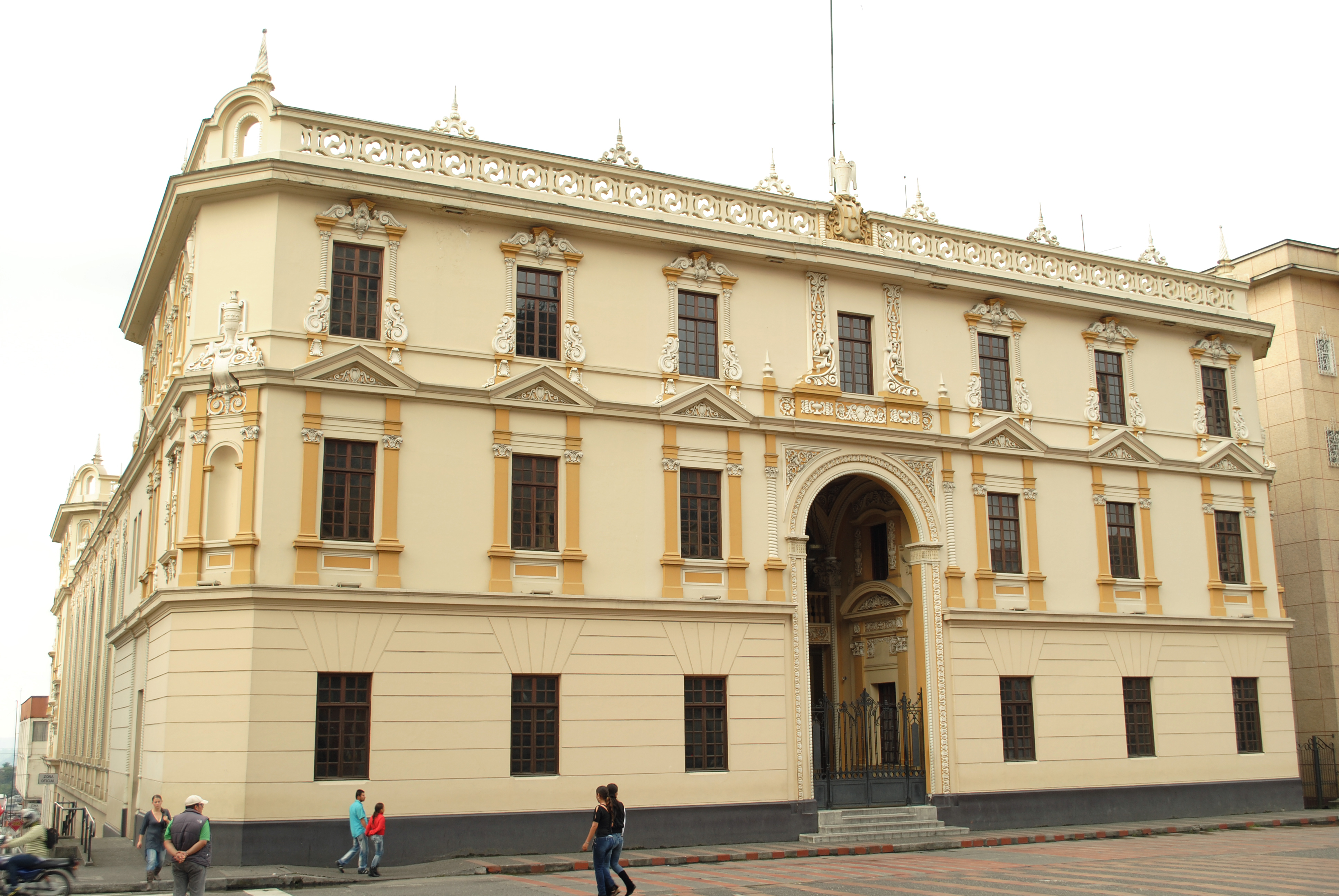 vista general de la gobernación desde la plaza de bolivar